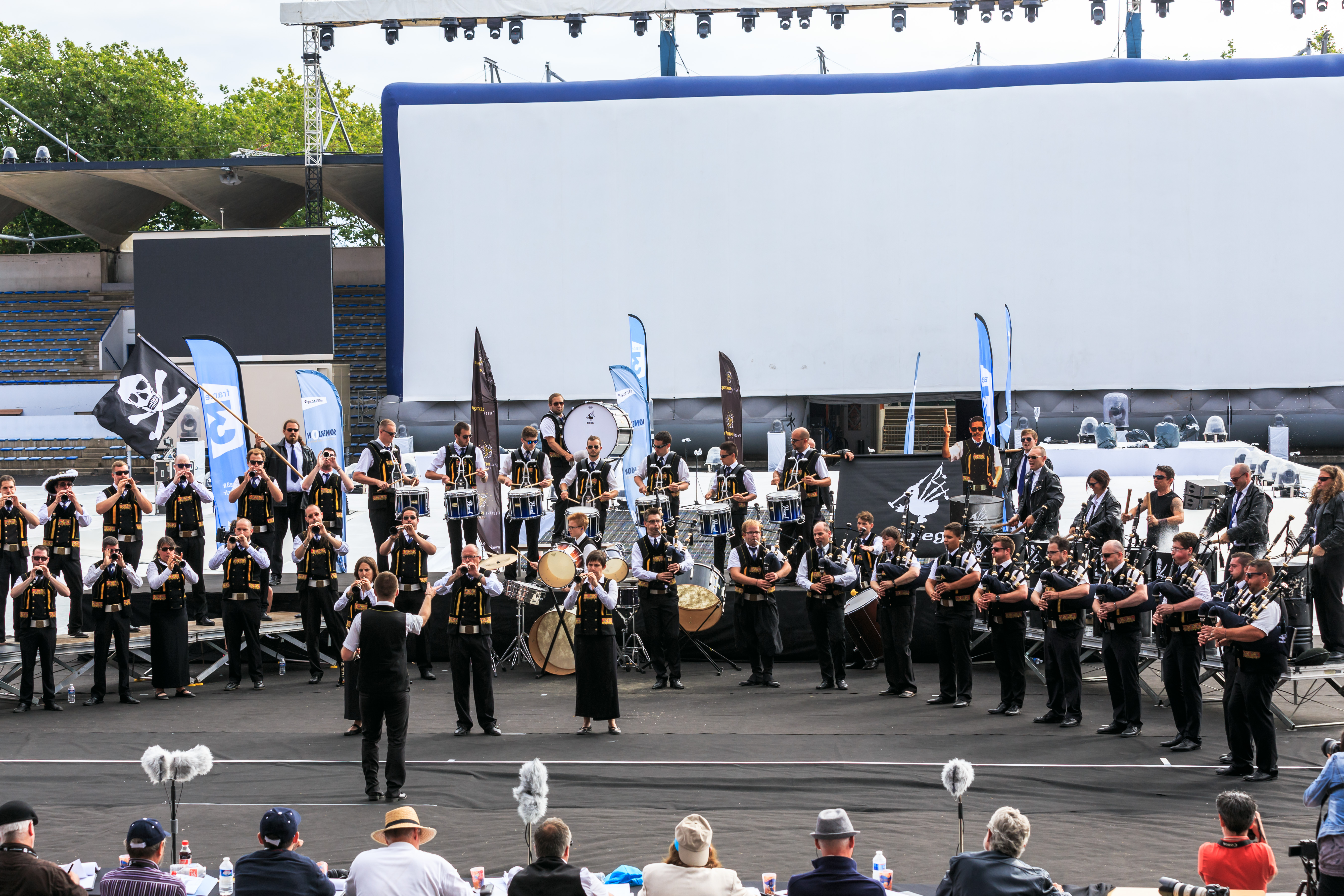 Épreuve d'été du Championnat national des bagadoù de Première catégorie organisée au stade du Moustoir dans le cadre du Festival Interceltique de Lorient en Bretagne.